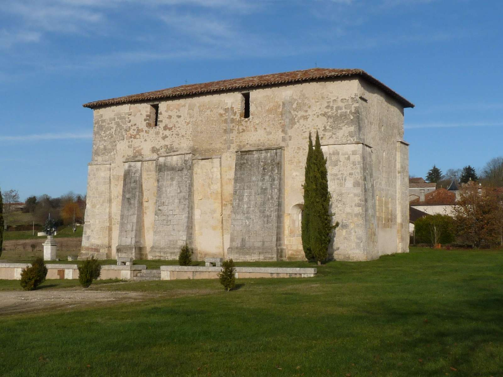 église de Comberanche, Dordogne, France